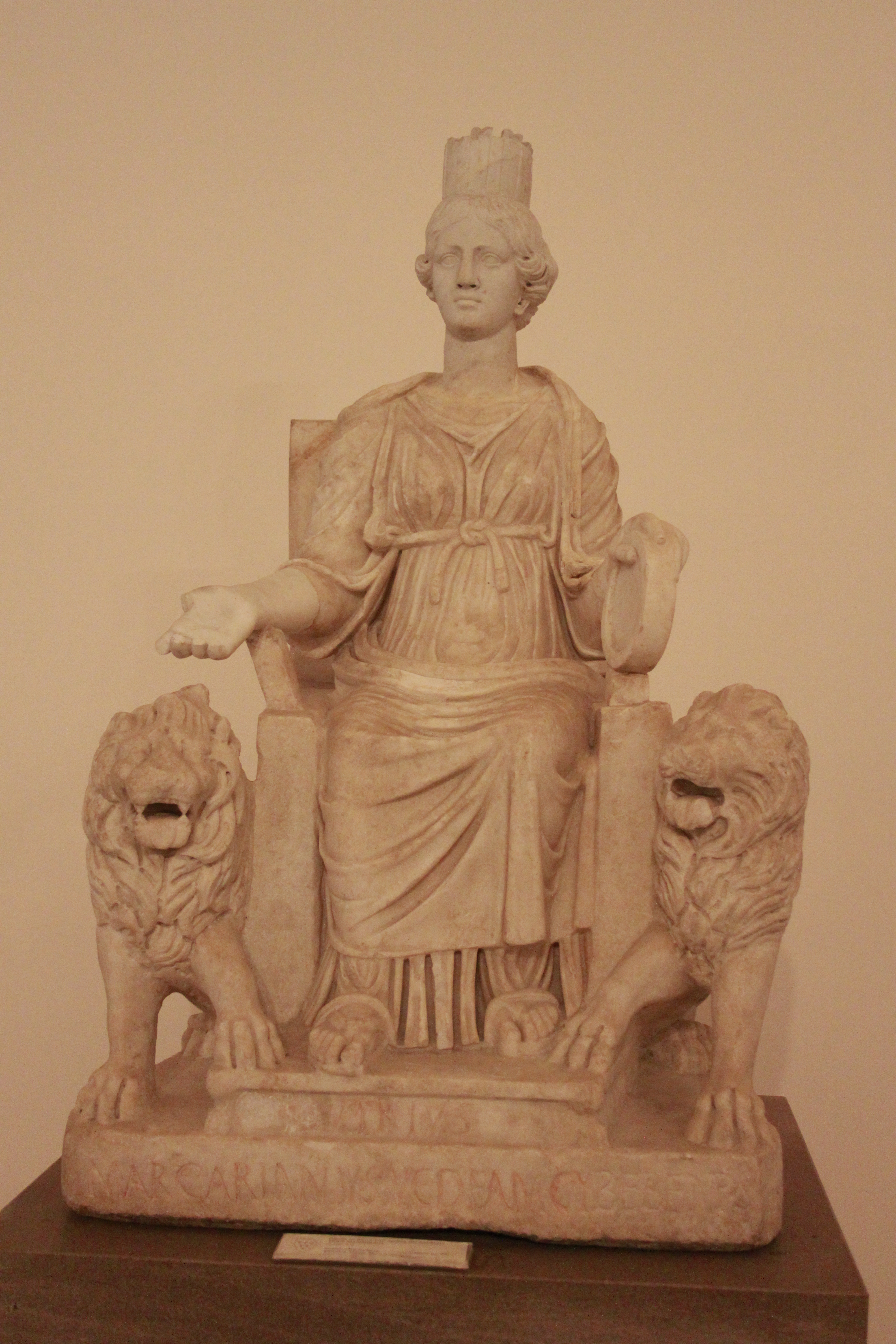 Cibele, arte romana, III secolo d.C., con dedica al senatore Virius Marcarianus, conservata al Museo archeologico nazionale di Napoli